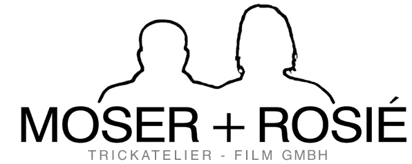 Logo der Filmproduktionsfirma Moser+Rosié